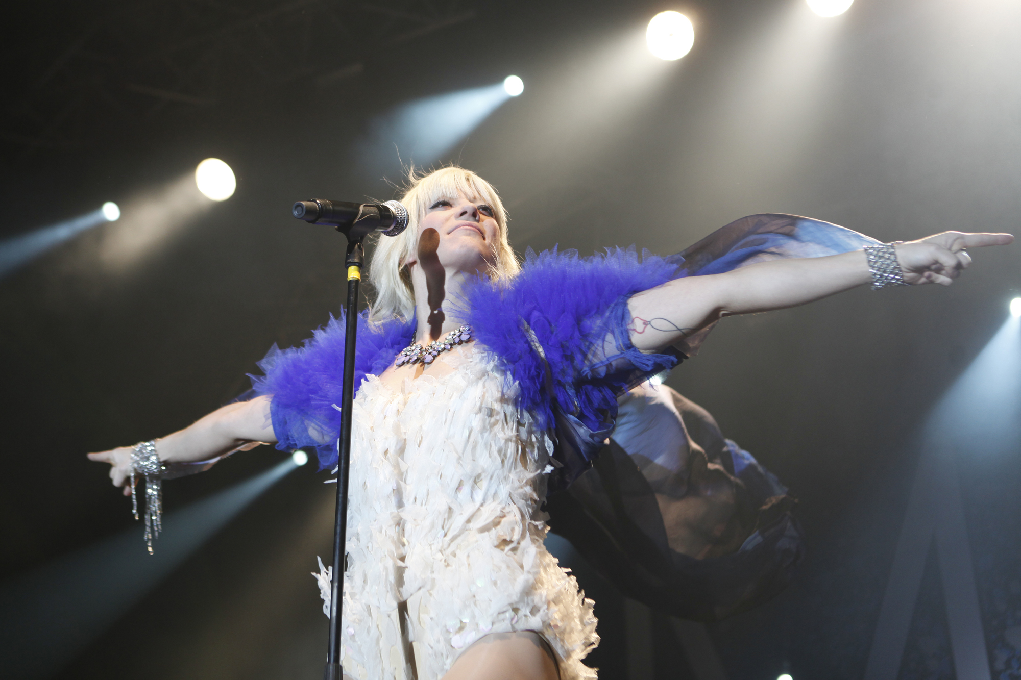 Die Sängerin der deutschen Elektropop-Band MIA. Mieze Katz bei einem Konzert in der Stadthalle Offenbach am 13.12.2012.